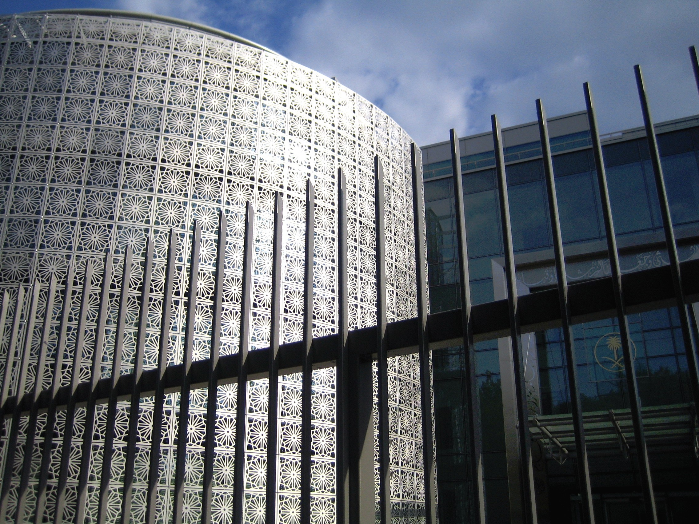 Neubau der Botschaft Saudi-Arabiens in Berlin-Mitte, Tiergartenstraße 34. Teilansicht.